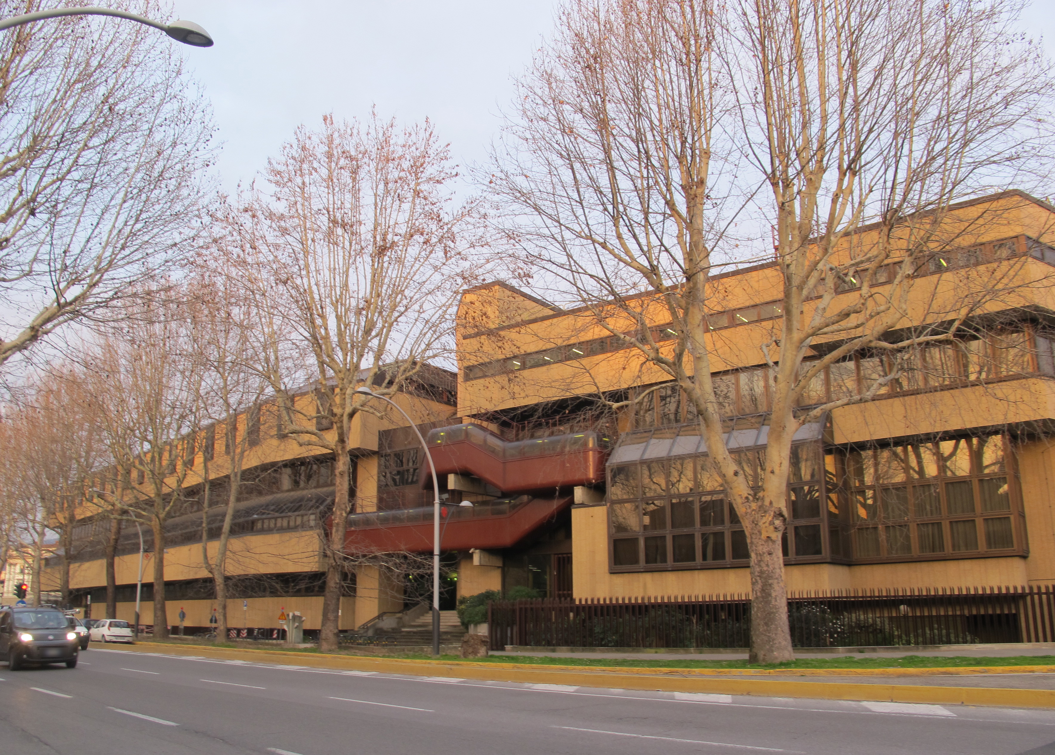 Archivio di stato di firenze, retro